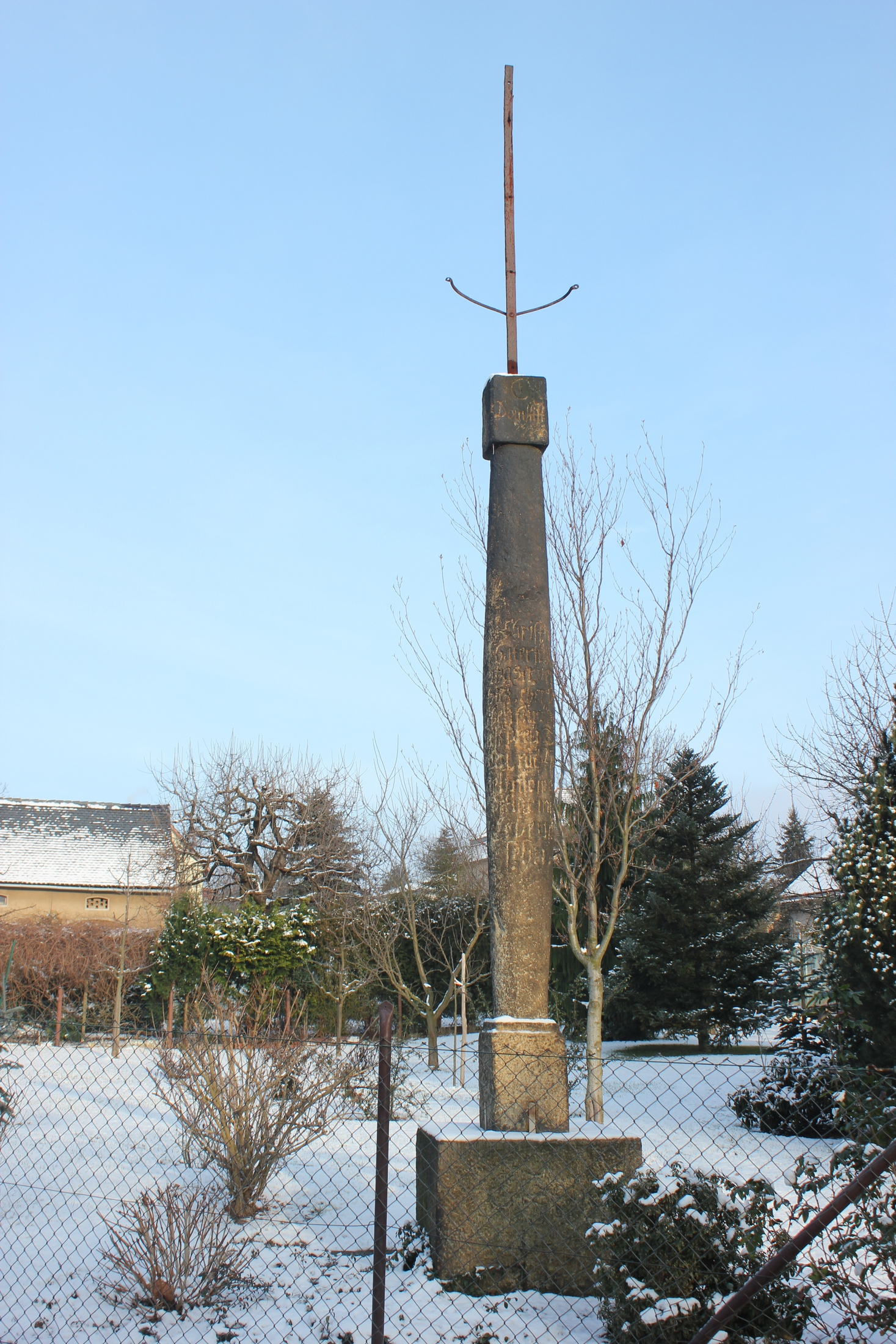 Hornjoserbsce: Modlerski stołp w Dźěžnikecach, gmejna Hornja Hórka.